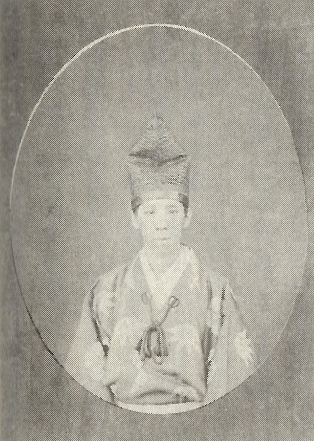 冷泉為紀の肖像写真。